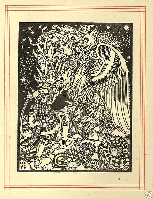 Русские народные сказки